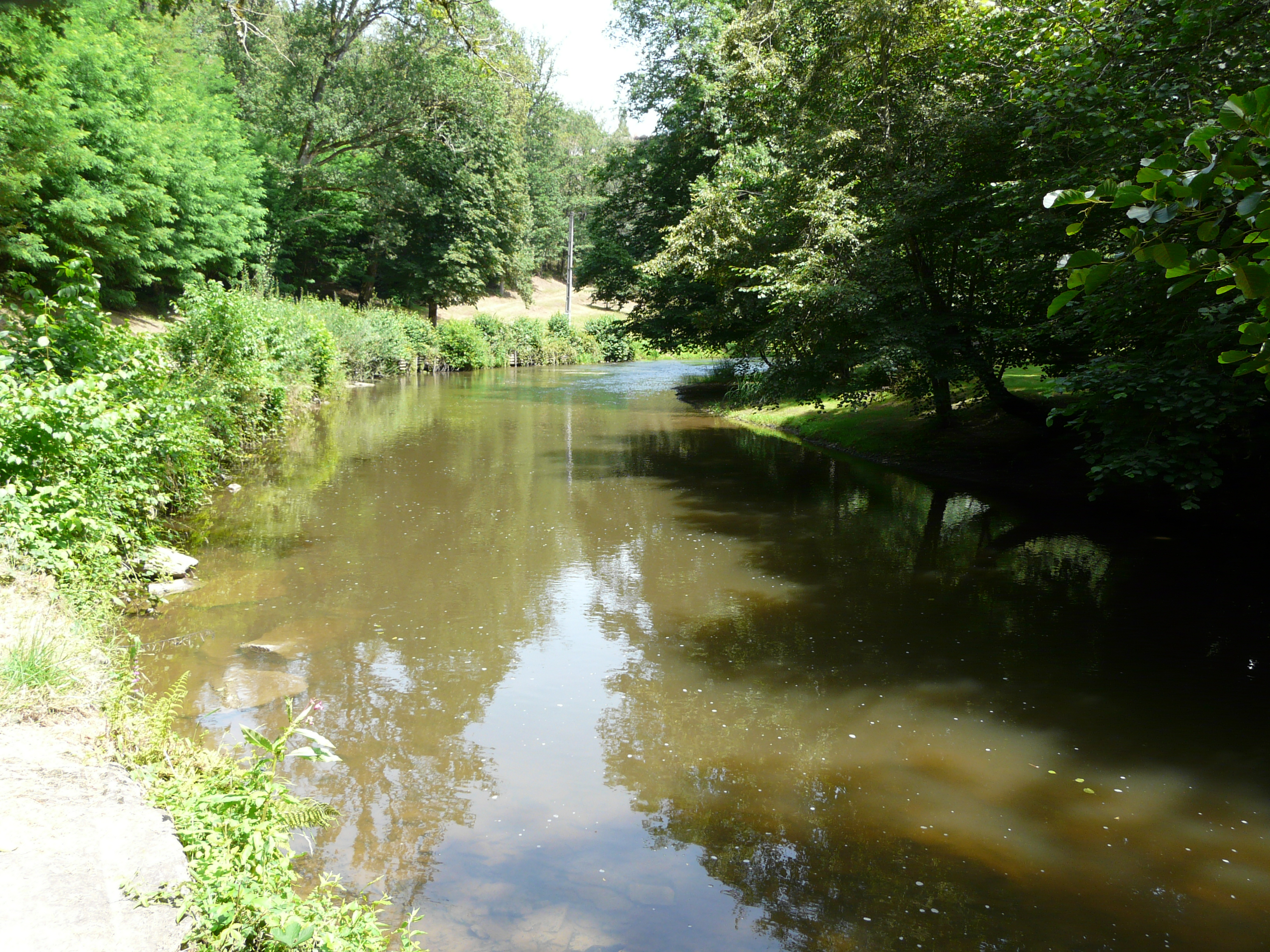 L'Isle en amont du pont menant à la Peyrière, Jumilhac-le-Grand, Dordogne, France. Vue prise en direction de l'amont.